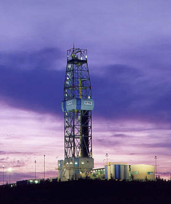 Bohrturm der KTB bei Windischeschenbach Fotograf: Walter J. Pilsak, Waldsassen Copyright Status: GNU Freie Dokumentationslizenz